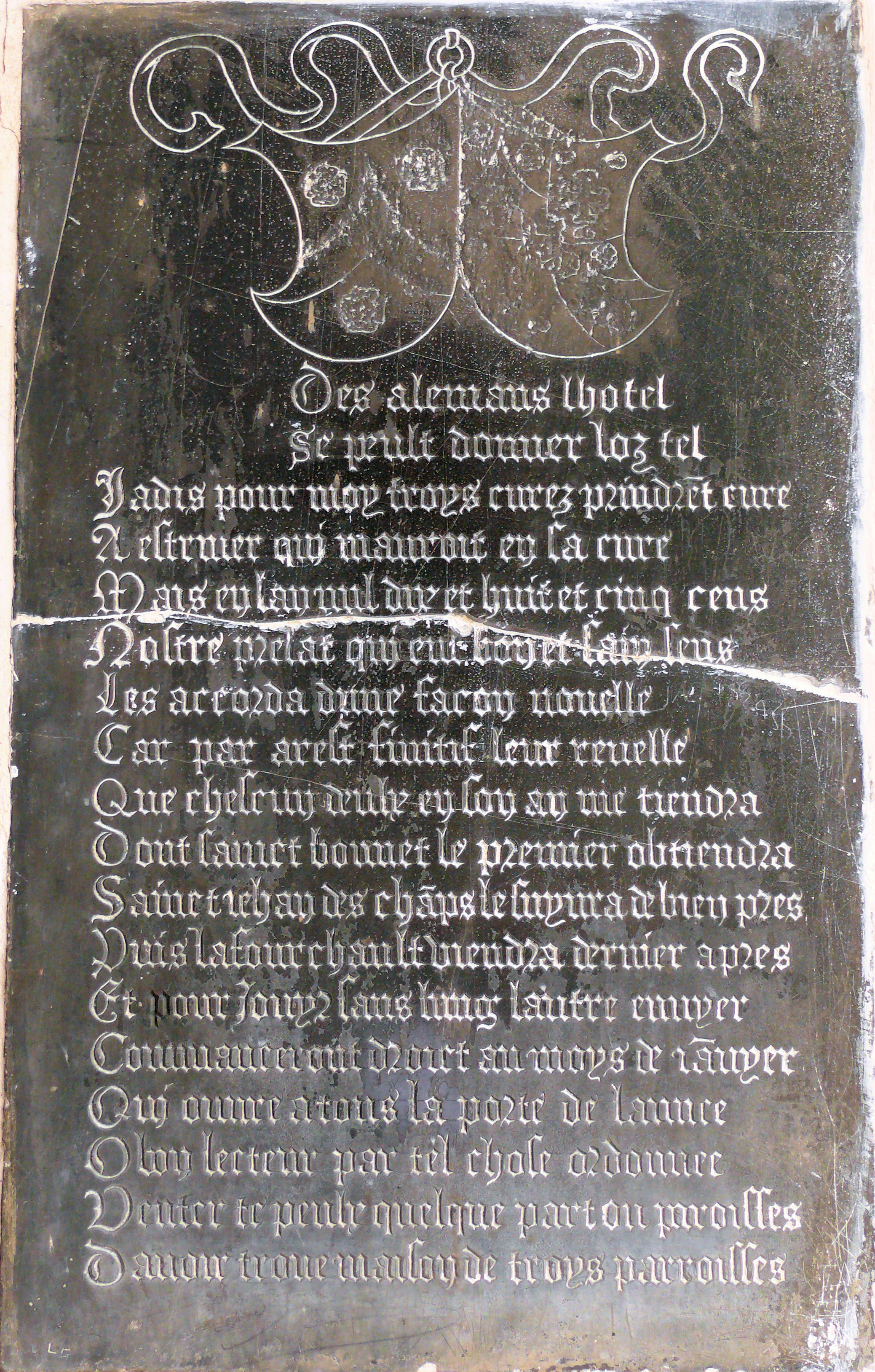 Bourges - Hôtel Lallemant - Plaque commémorative